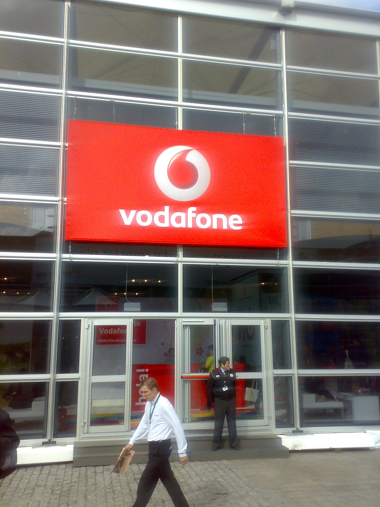 Vodafone stand at GSMA Barcelona